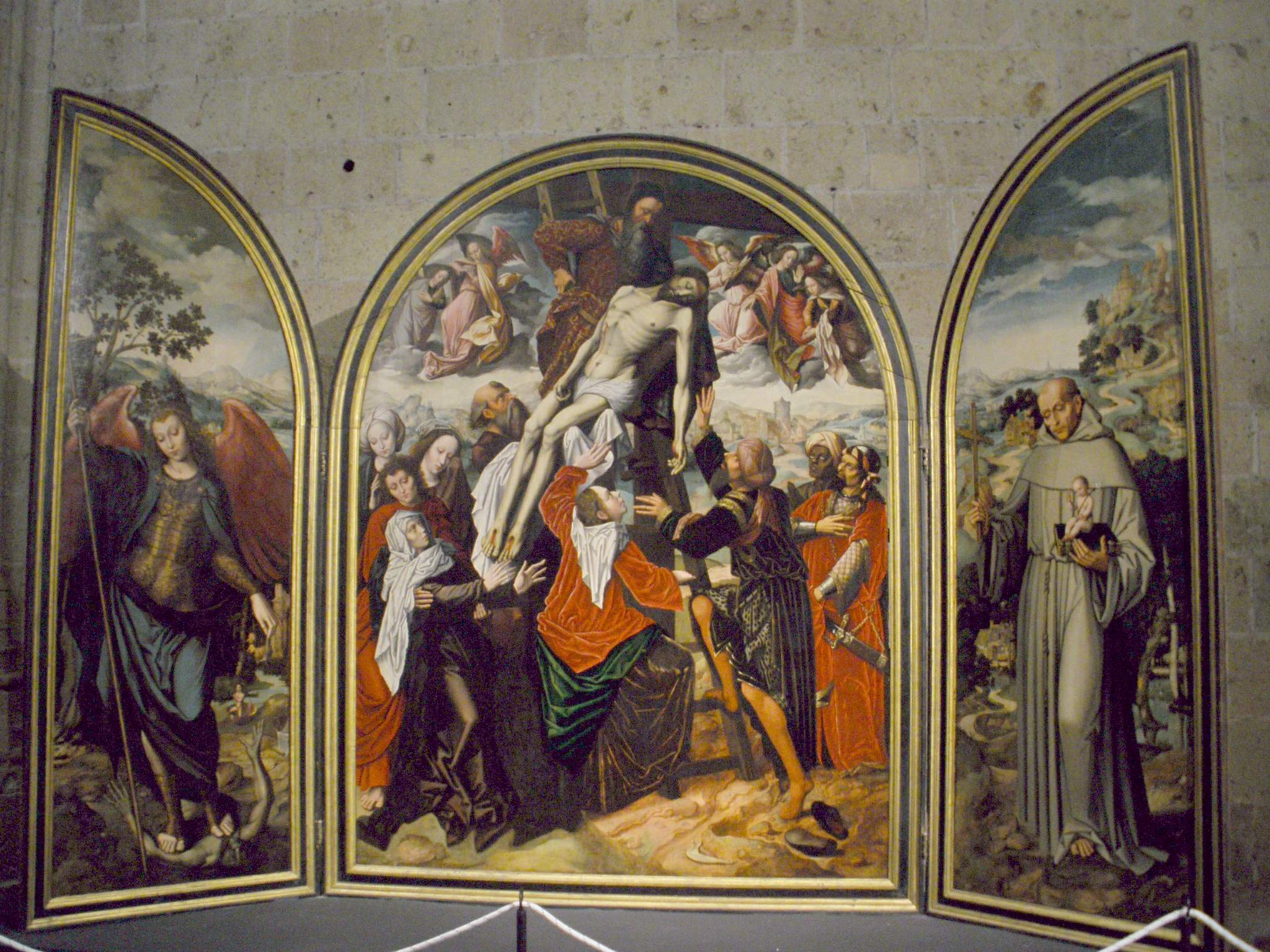 Tríptico 'El Descendimiento'label QS:Len,"Tríptico 'El Descendimiento'"